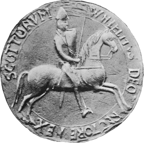 苏格兰国王威廉一世的印章。